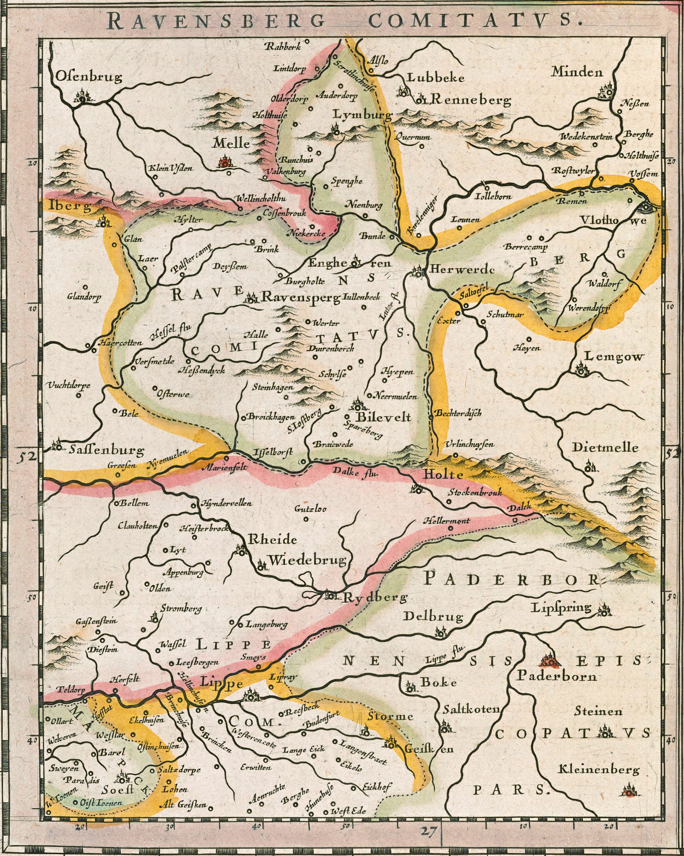 Historische Karte der Grafschaft Ravensberg in Comitatus Marchia et Ravensberg aus dem Atlas Theatrum orbis terrarum, sive, Atlas novus in quo Tabulae et Descriptiones omnium Regionum